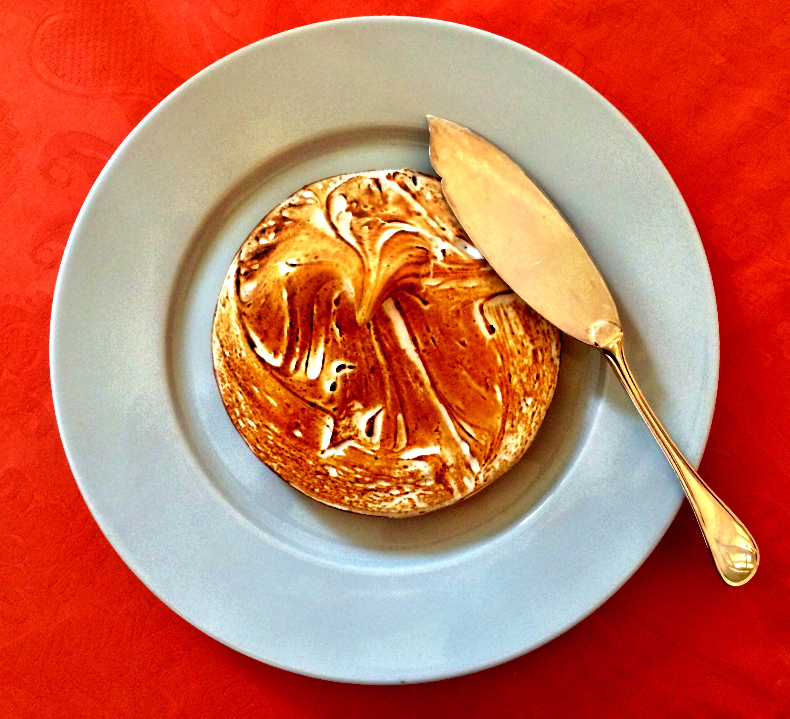 Tarte au citron meringuée, la faite à Paris, France